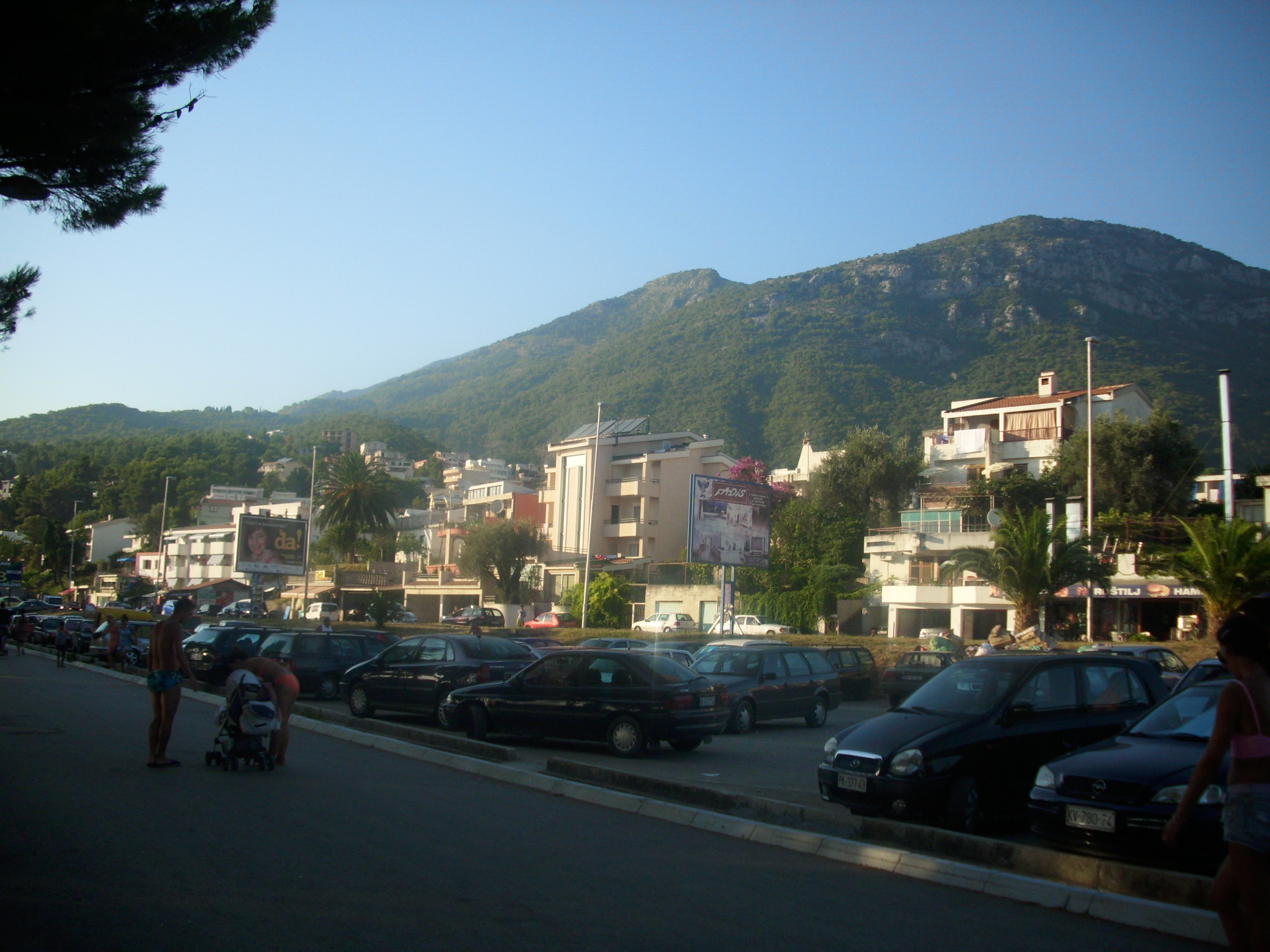 Glavna ulica u Šušnju